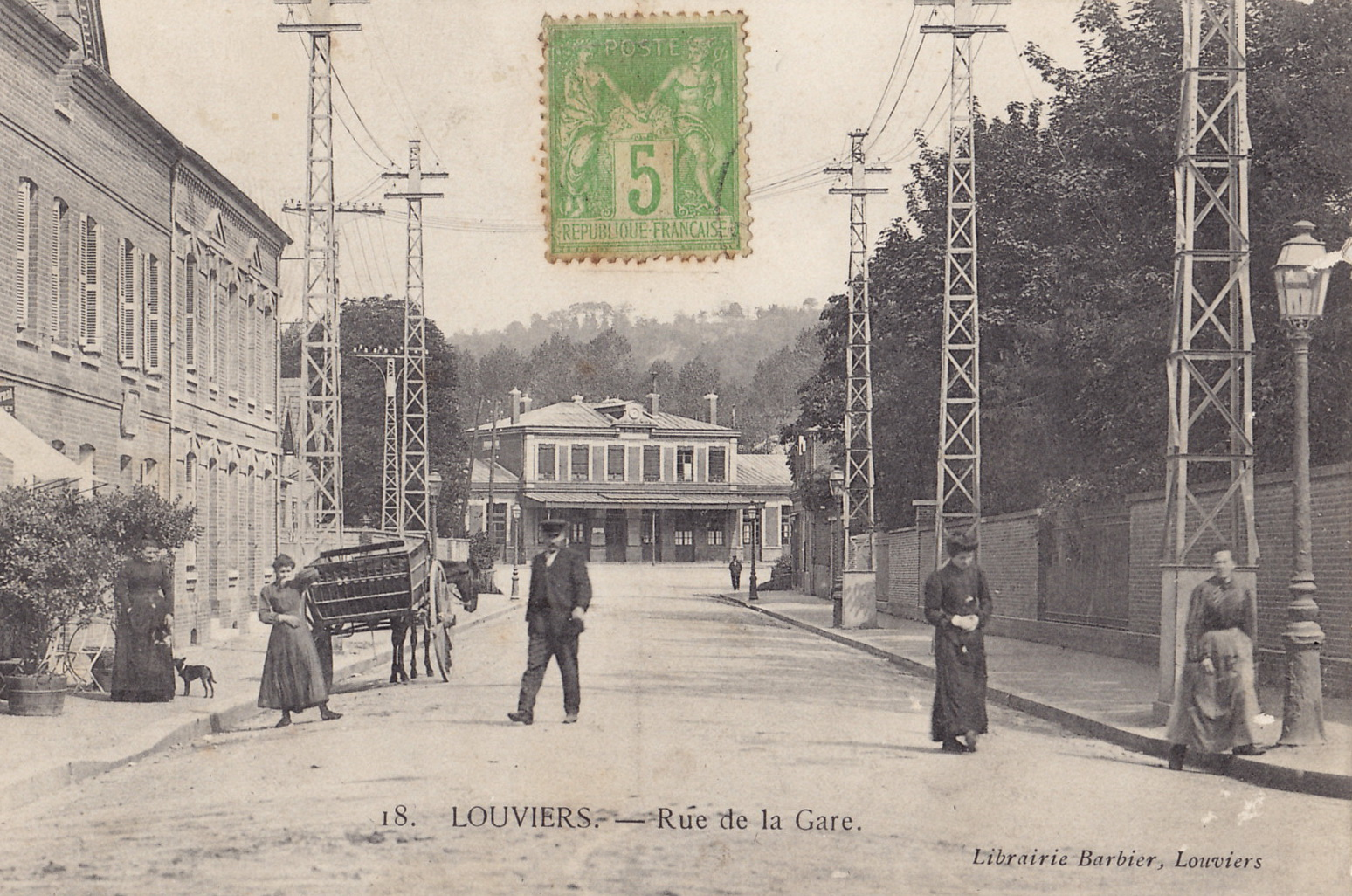 Carte postale ancienne éditée par Librairie Barbier à Louviers :LOUVIERS - Rue de la Gare